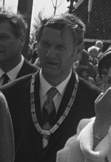 Koningin Juliana bij mosterdmolen De Huisman aan de Zaanse Schans, geflankeerd door burgemeester van Westzaan F. Verstegen, commissaris van de koningin mr. F. Kranenburg (r) en wethouder van Zaandam D. Metselaar (l)